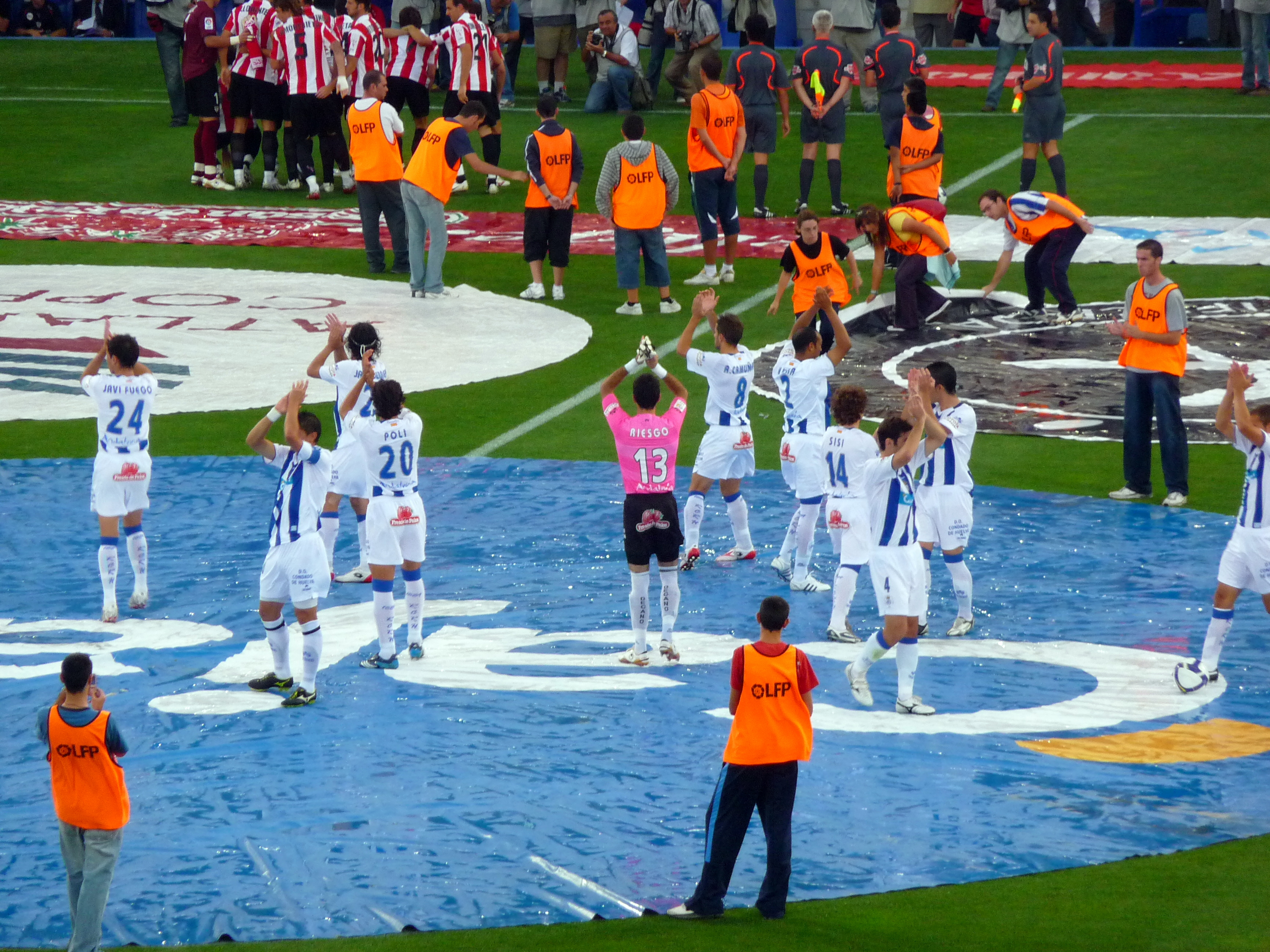 Presentación del Real Club Recreativo de Huelva en su partido de la Liga Española ante el Athetic de Bilbao.